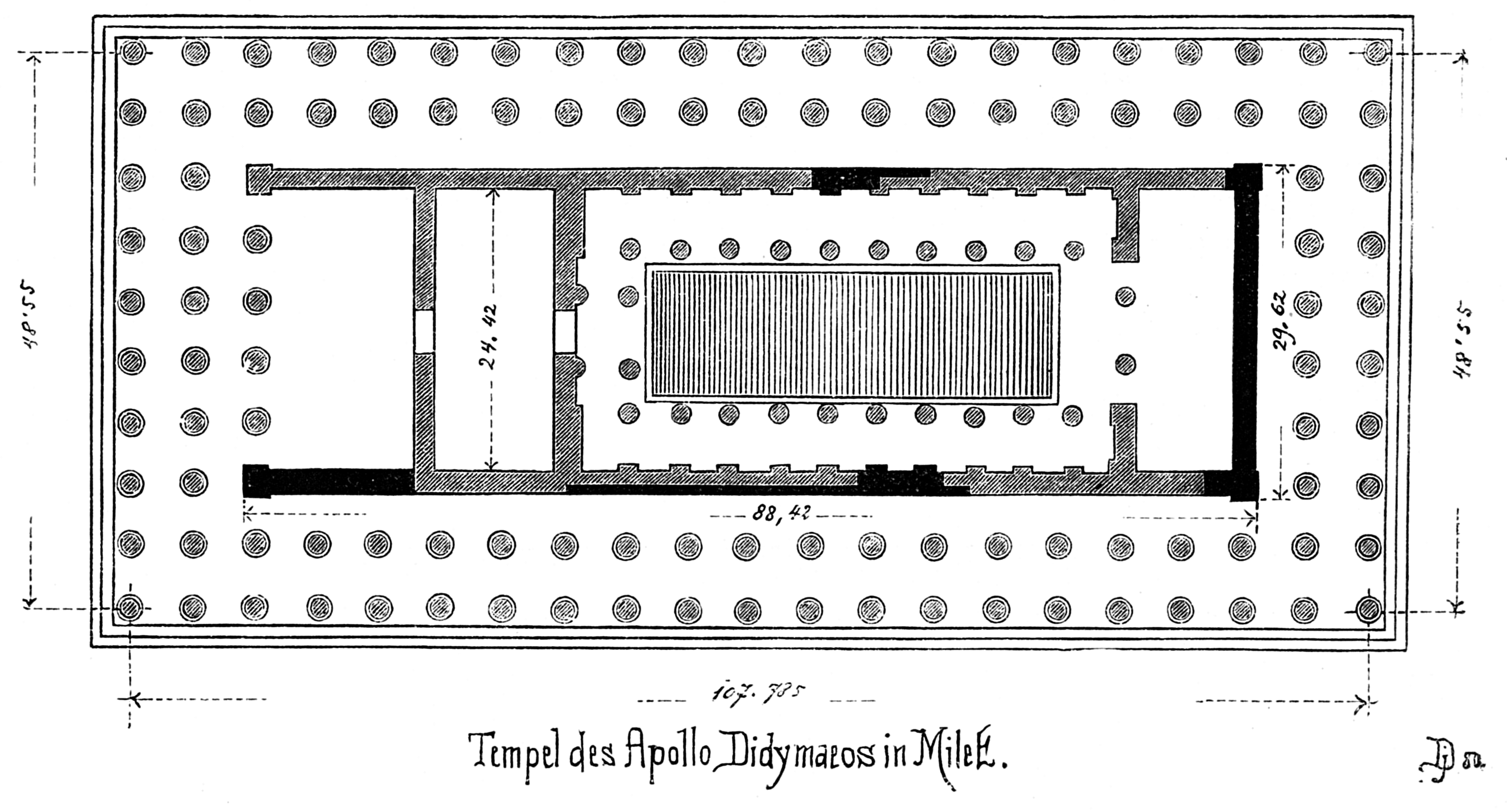 Der Tempel des Apollo Didymaeos in Milet. Die Zeichnung findet sich in: Handbuch der Architektur. II. Theil: Die Baustile. Historische und technische Entwicklung. 1. Band: Josef Durm: Die Baukunst der Griechen. Darmstadt 1881. 2. Aufl. Darmstadt 1892. S. 272.